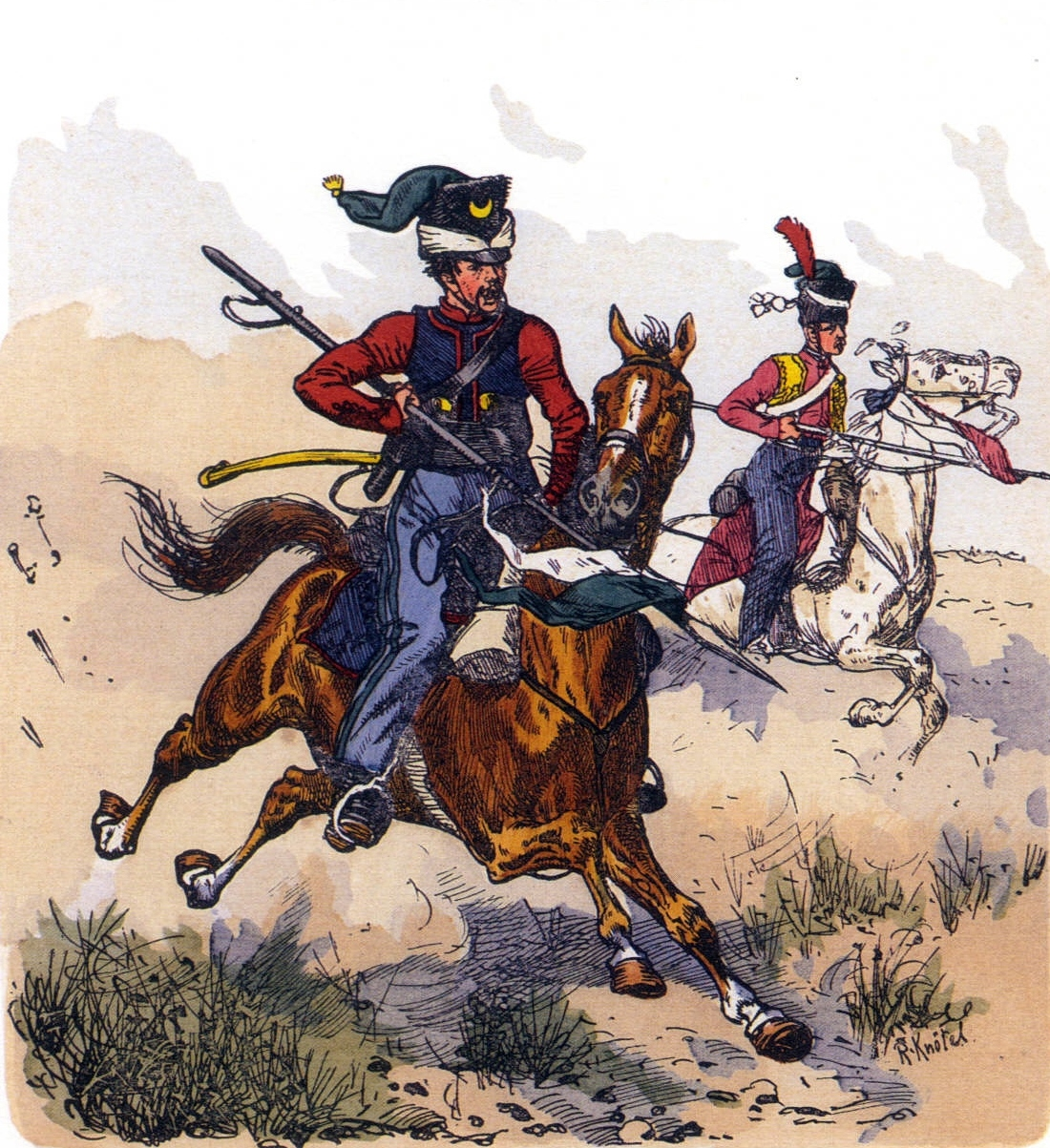 Des Tartares lituaniens de l'escadron de la Garde impériale. Celui au premier plan est représenté en uniforme de 1812, l'autre porte le costume revêtu en 1813 puis en 1814.